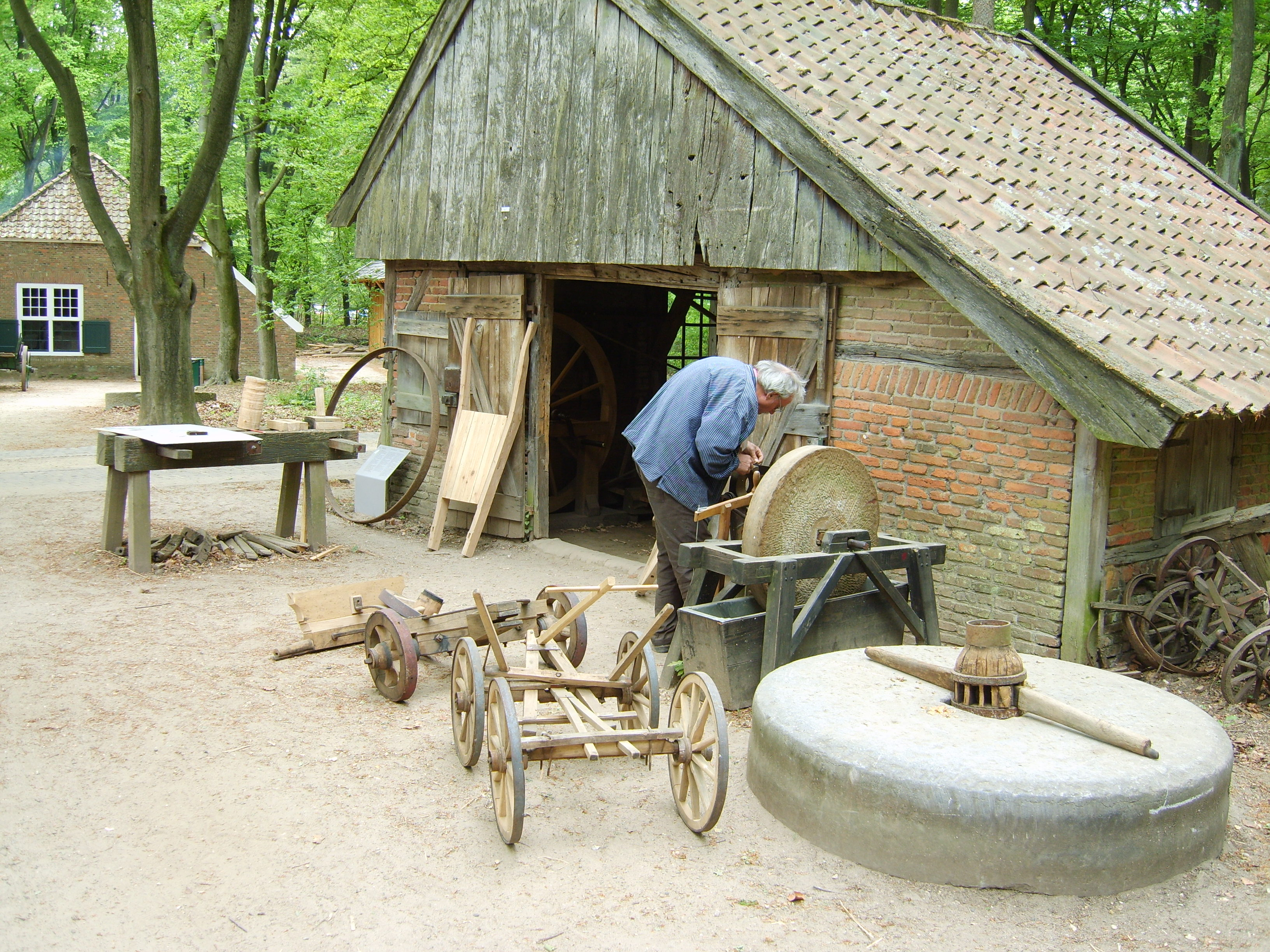 Nederlands Openluchtmuseum